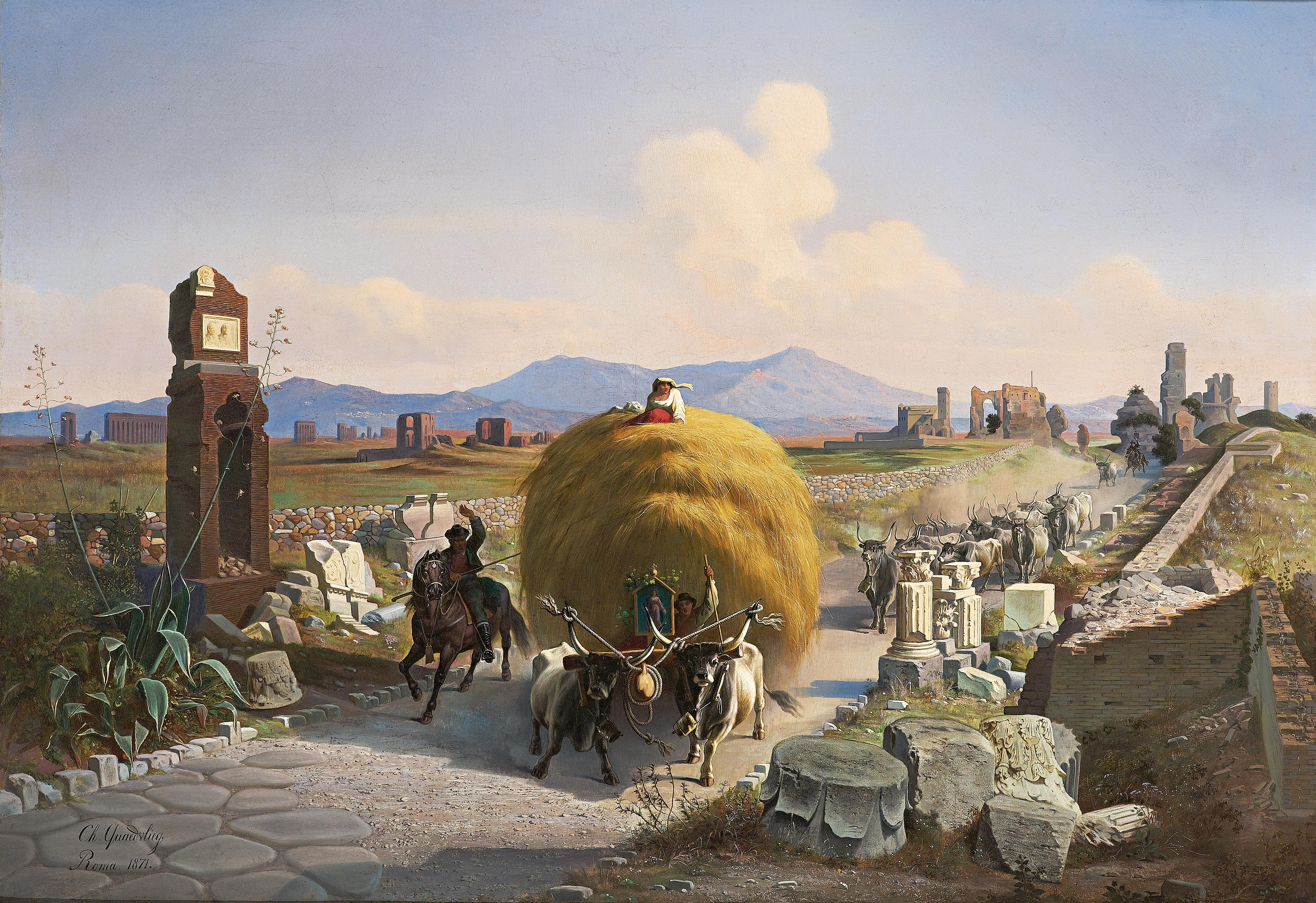 Via Appia, signiert, bezeichnet und datiert Charles. Quaedvlieg. Roma.1871., Öl auf Leinwand auf Holz, 70 x 100 cm